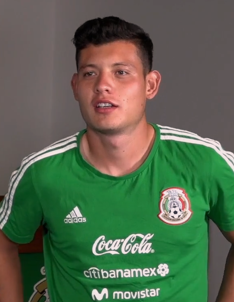 Oswaldo León en 2018